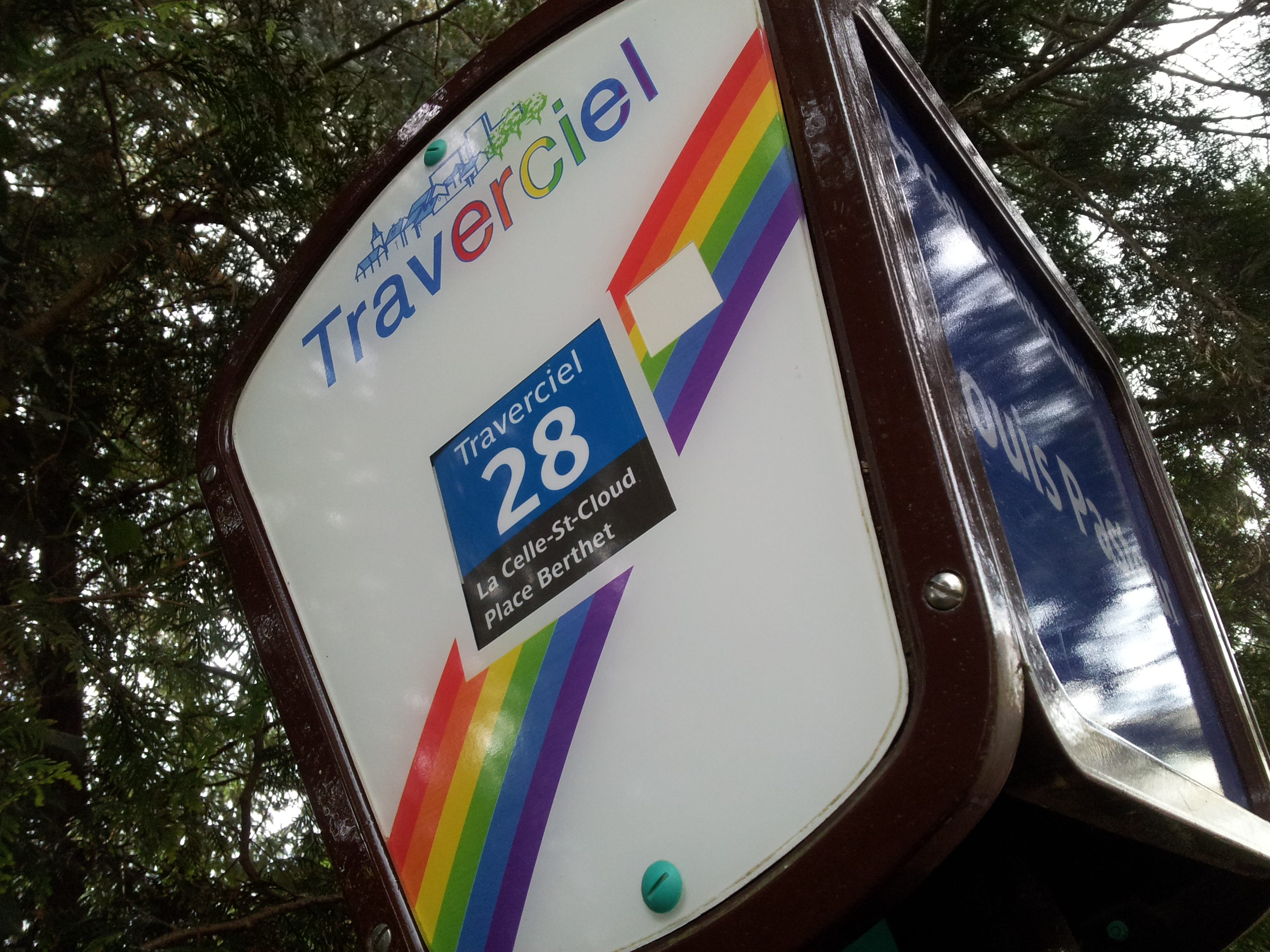 Potelet mixte RATP / Veolia Transdev, utilisé sur le réseau Traverciel, à La Celle-Saint-Cloud, Yvelines, France.